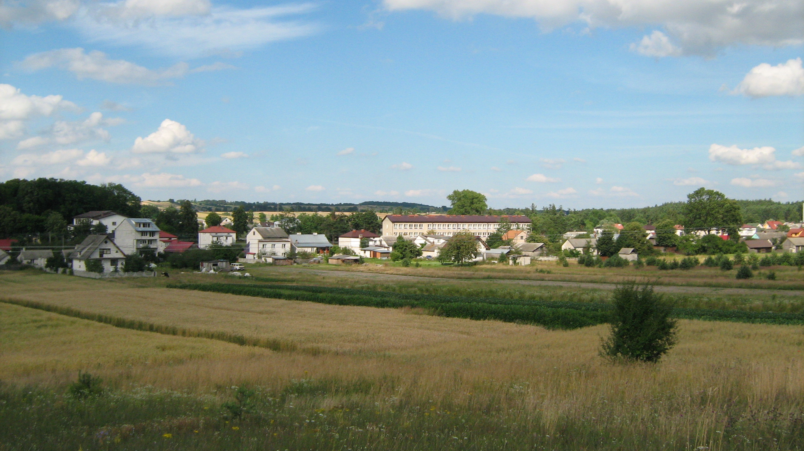 Panorama zabudowań Józefowa (pow. Biłgoraj) - widok z podmiejskich kamieniołomów.